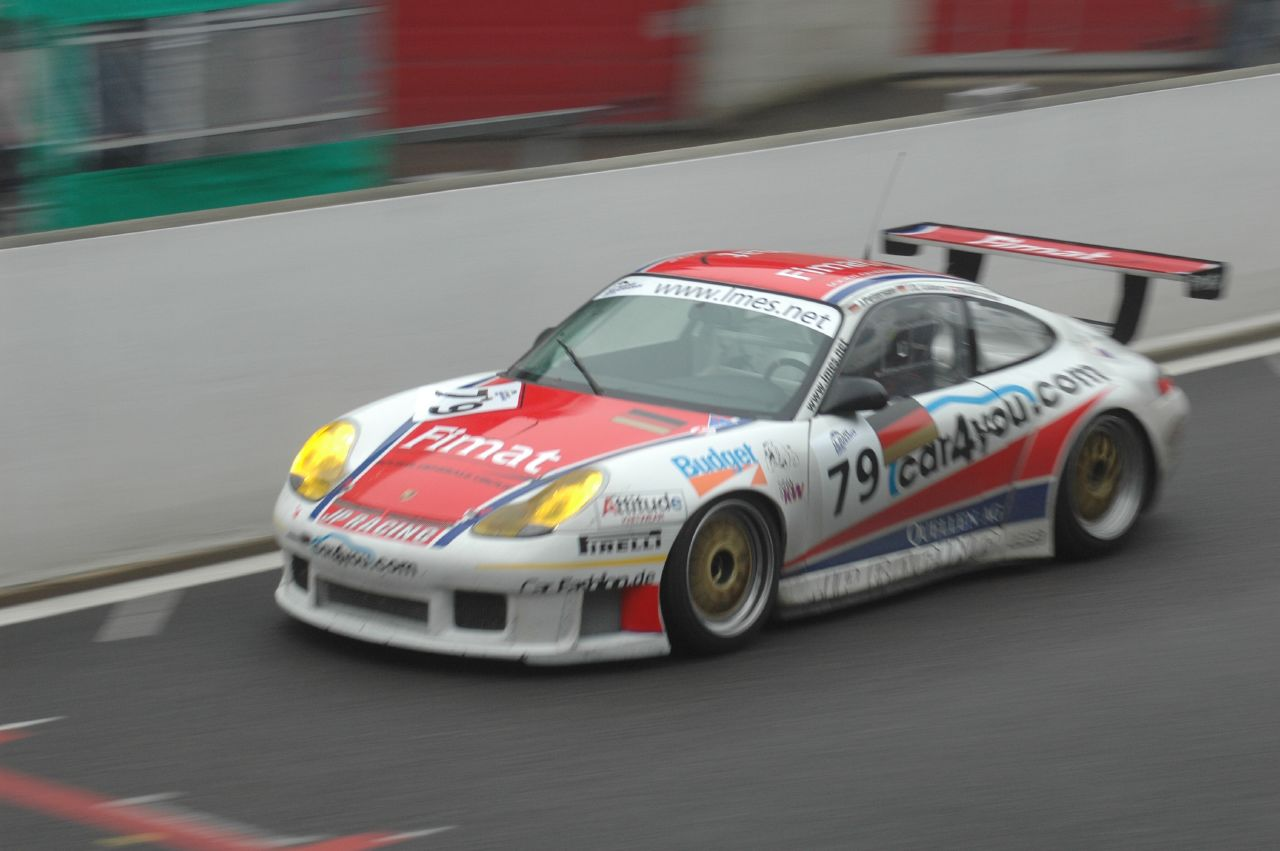 Porsche 911 GT3 RS 996 JP Racing - 79 - WPOZZZ99Z2S692087